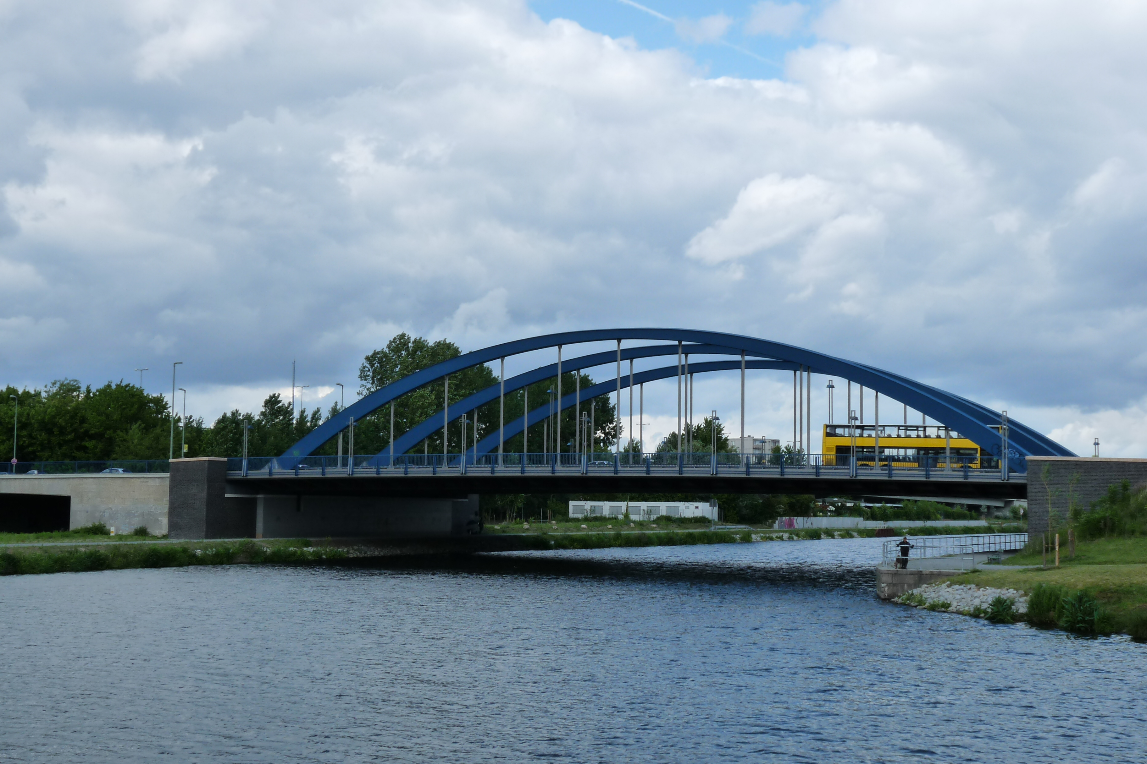 Mörschbrücke über den Westhafenkanal in Berlin